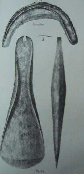 hache retouvée sur le site préhistorique de Ney